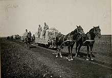 Lori-Gespann zwischen Keglewitsch und der 'Zvetko-Puszta' bei Tschanad (Privatfoto)